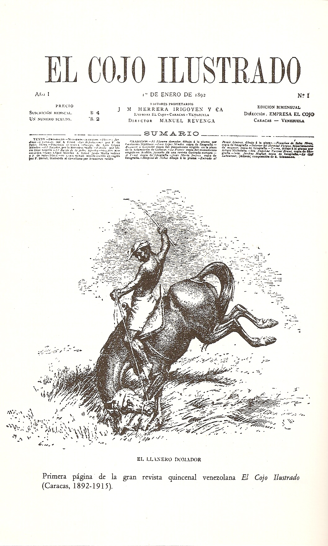 Prensa Venezolana del siglo XIX: El Cojo Ilustrado 1892